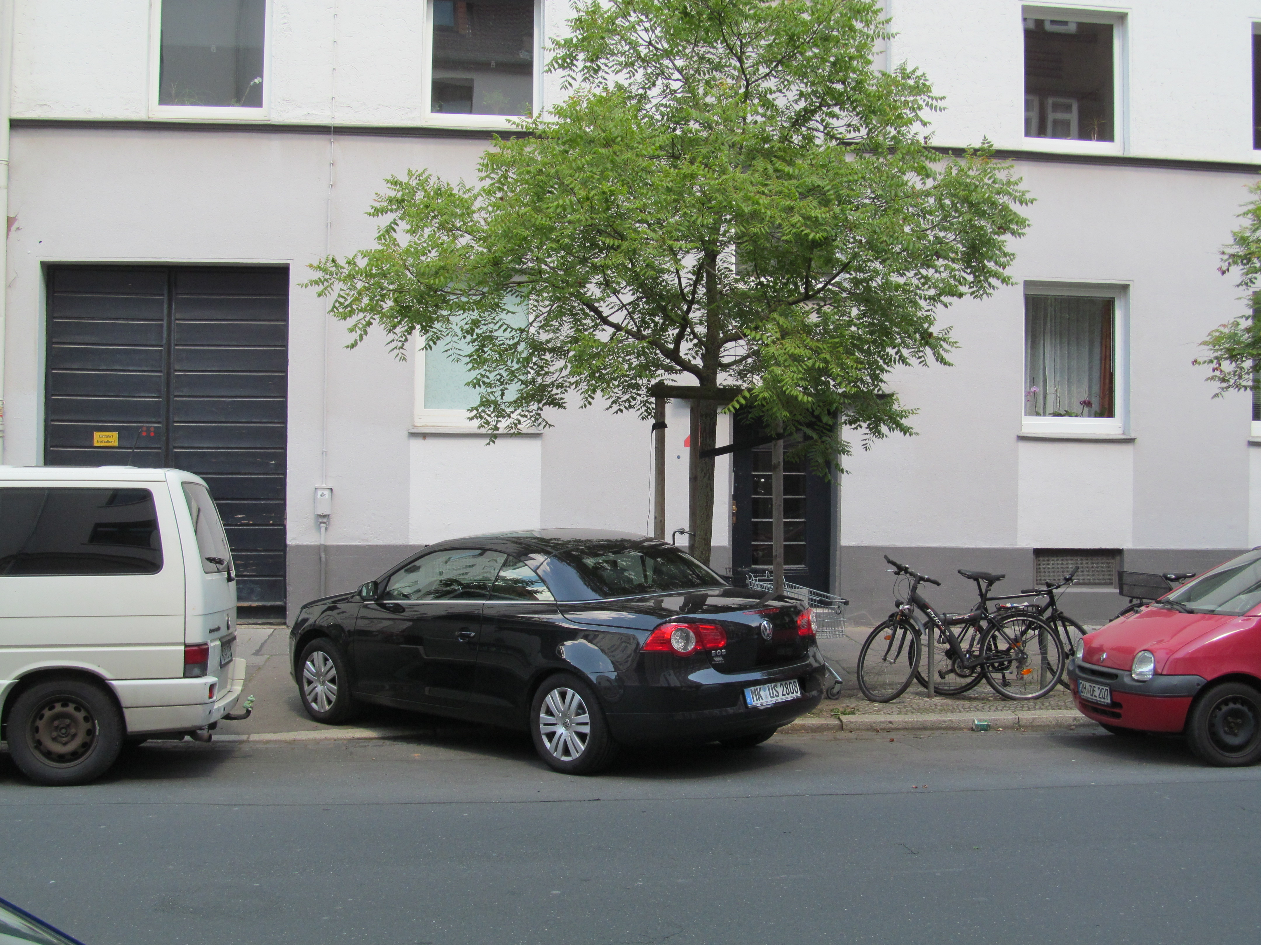 falsch parkendes Auto vor dem Haus Redenstraße 4 in Hannover, der weiße Transporter links dürfte vor der Einfahrt auch nicht parken, aber dies Auto hier hätte auch venünftig einparken können